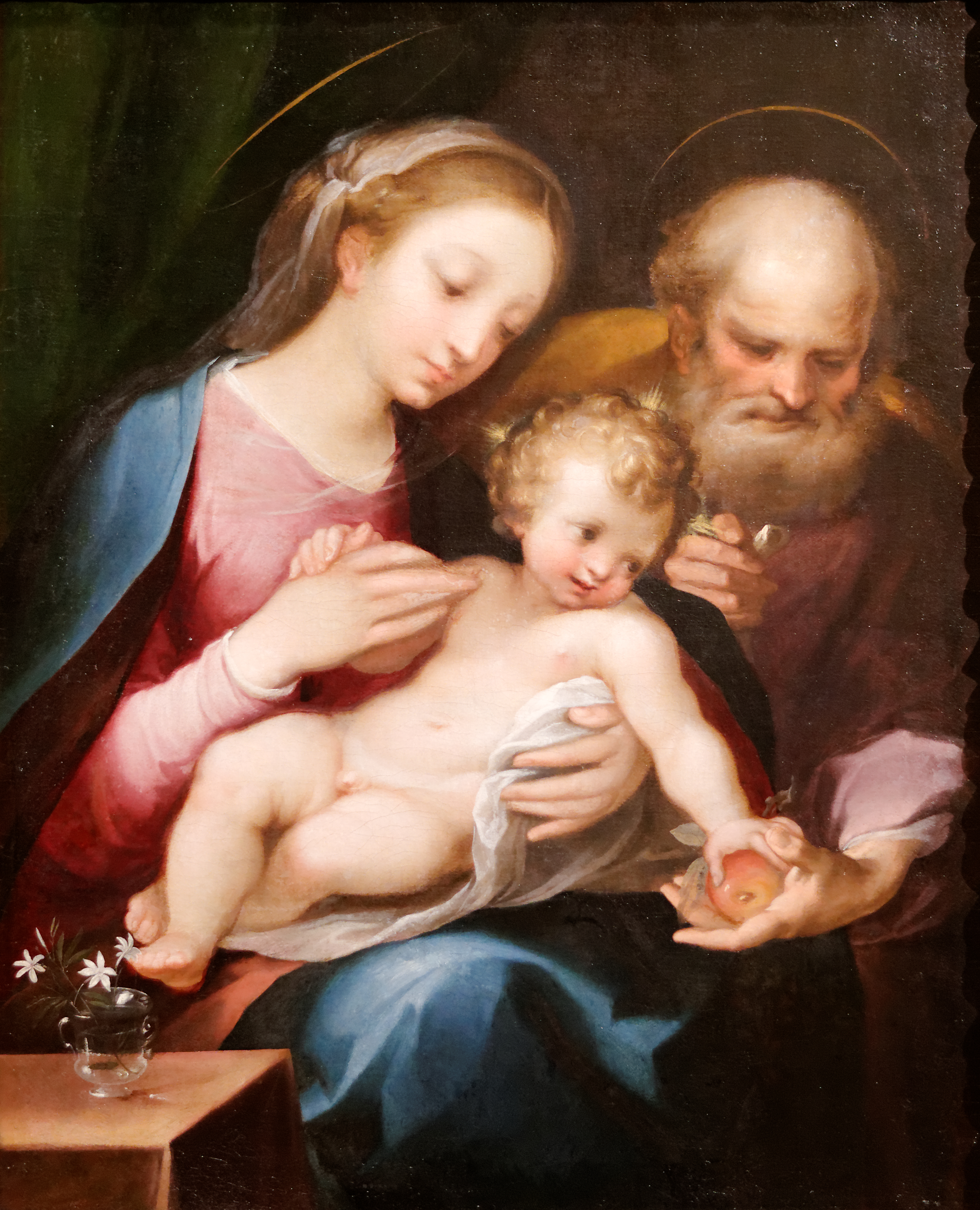 La Sainte Famille. Collection Esterházy